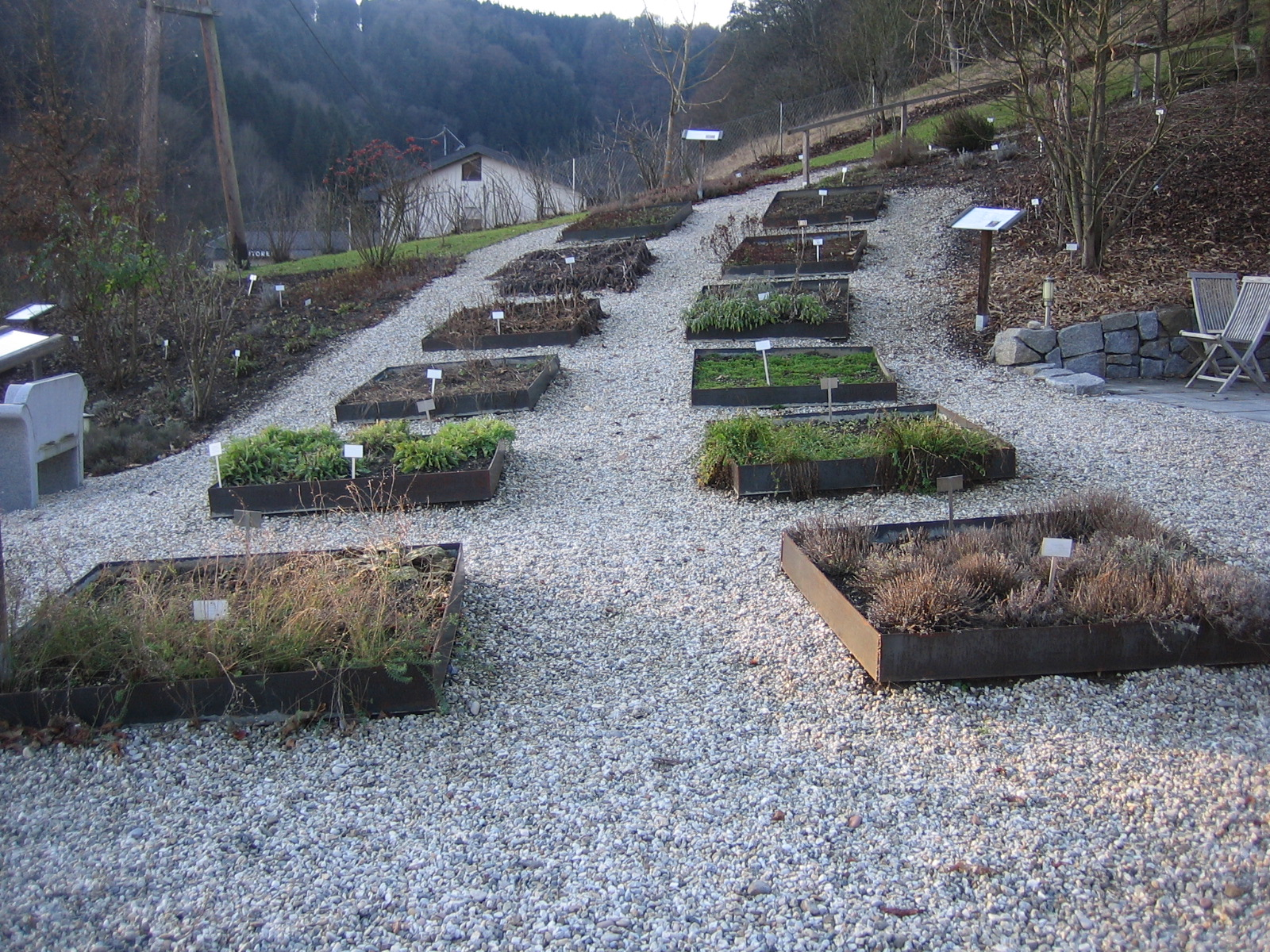 niedrige Kräuterbeete im Kräutergarten Bad Mühllacken